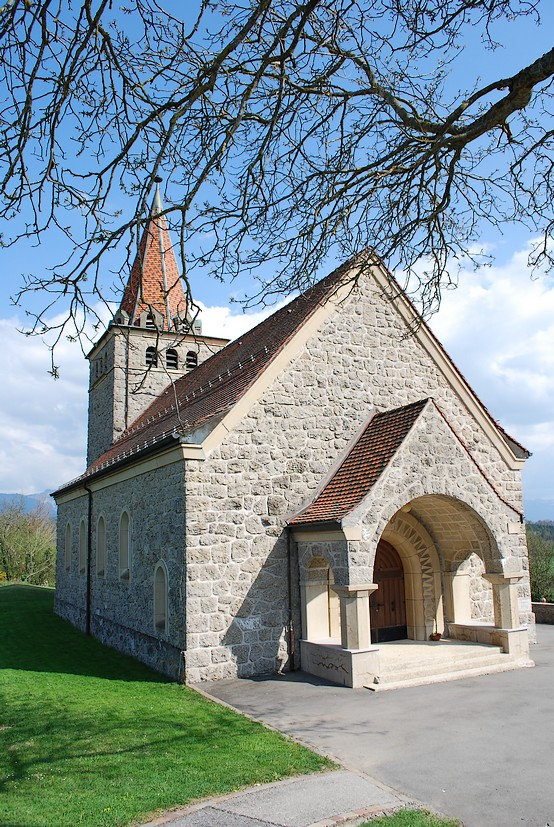 Vue de la chapelle St-Nicolas de Granges (canton de Fribourg)